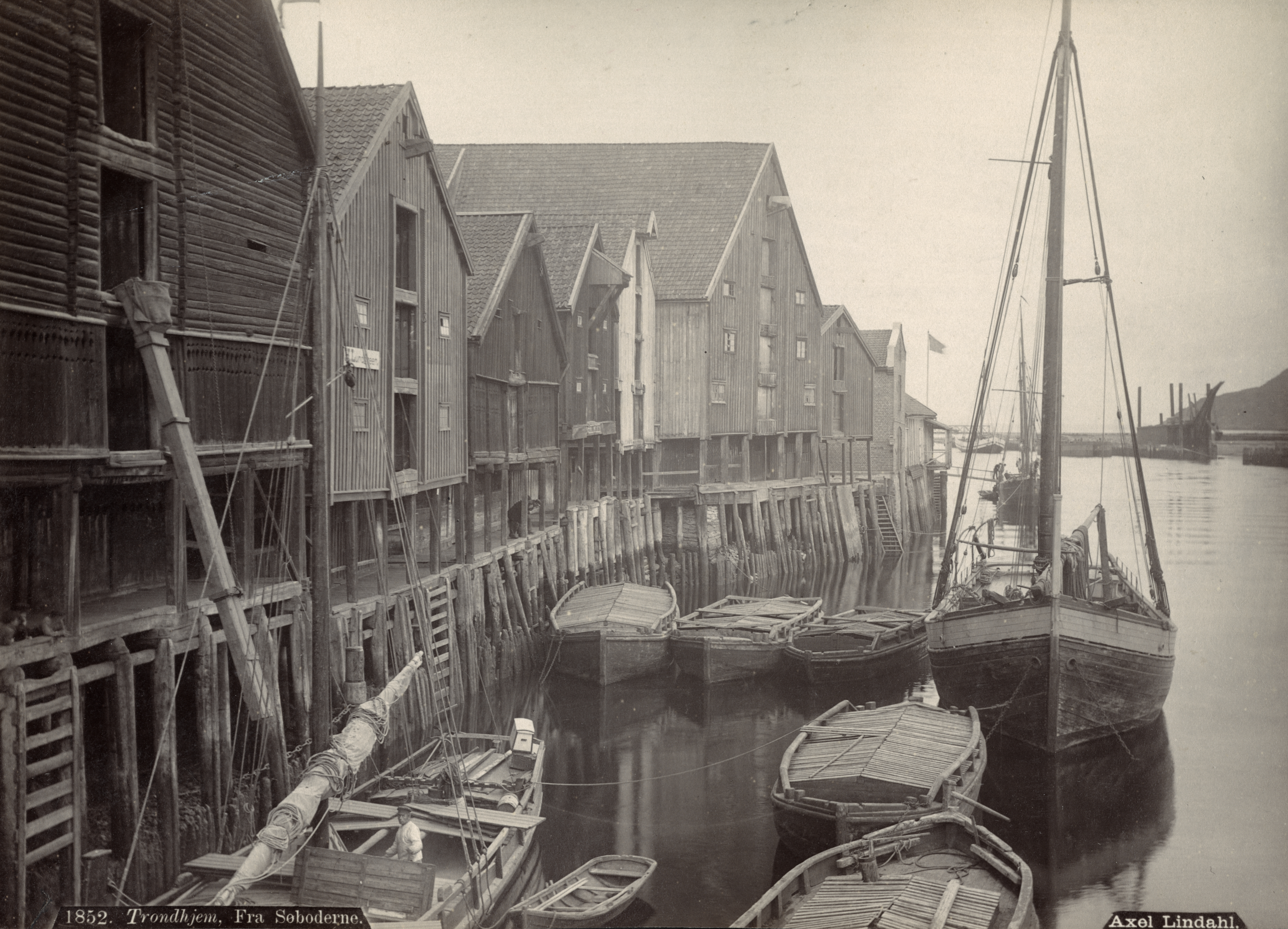 Trondheim i Trondheim, Sør-Trøndelag